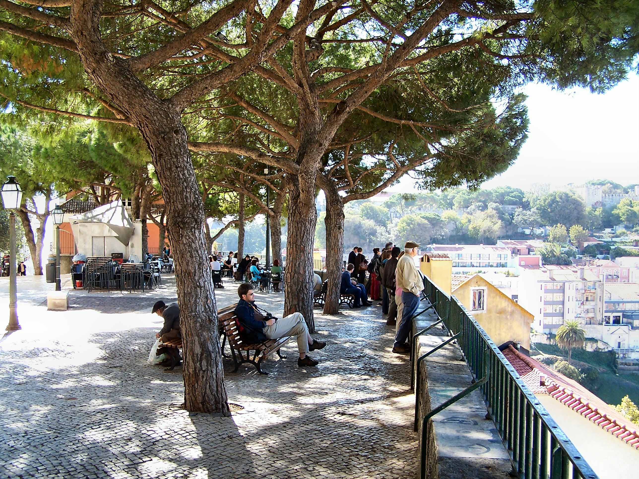 Lisboa - Miradouro da Graça